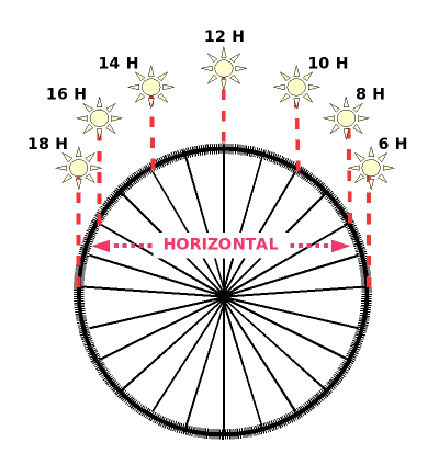 Reloj de Pastor RPLl2006